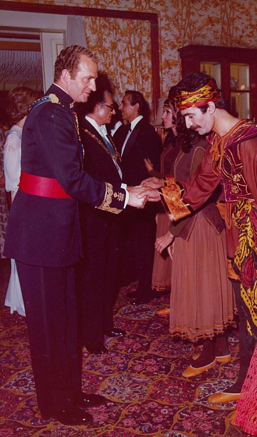 غلامرضا سخایی بعد از اجرای برنامه رقص کولی در حال دست با خوآن کارلوس پادشاه وقت اسپانیا در در کاخ نیاوران تهران